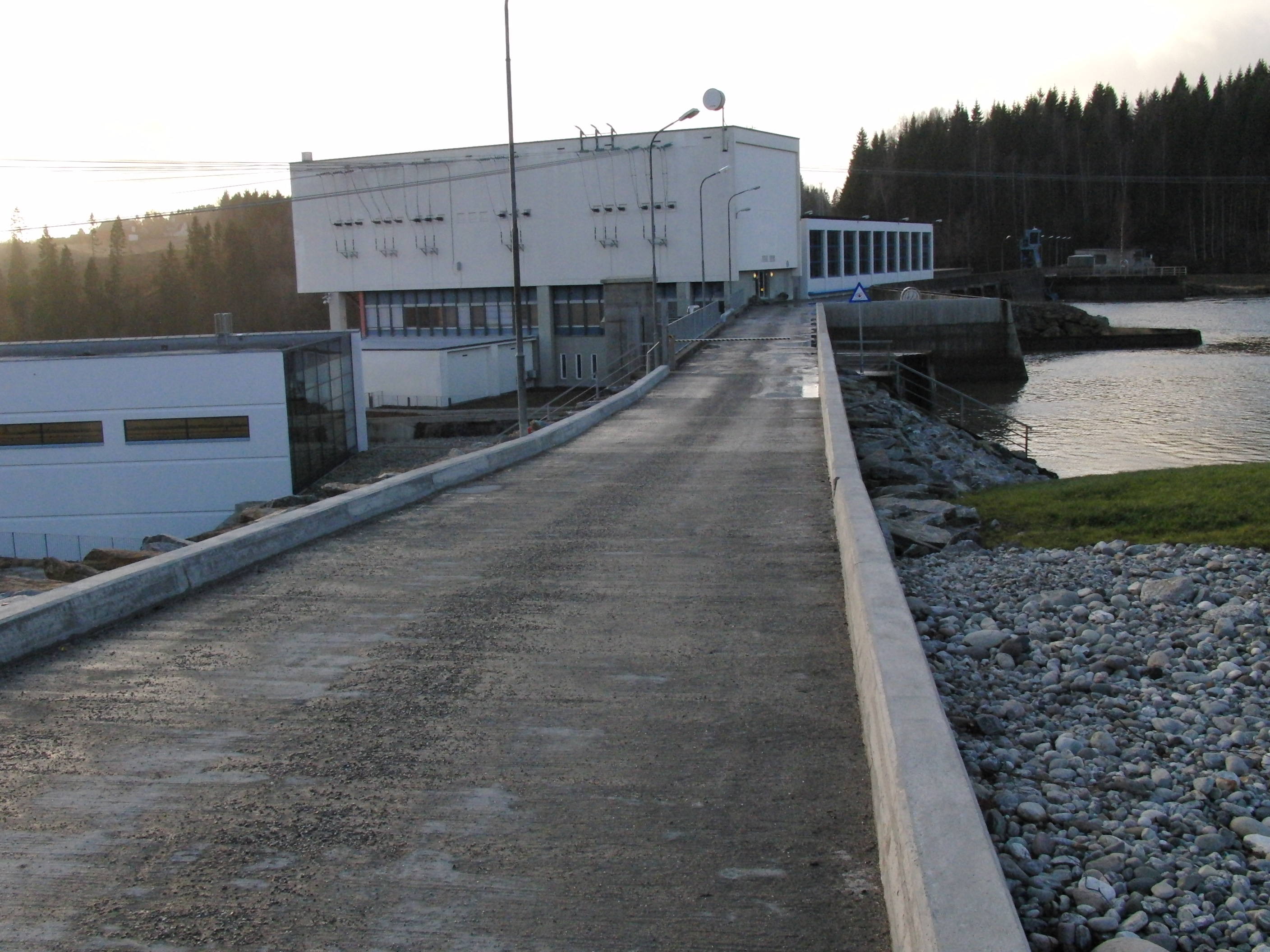 Kykkelsrud Fossumfoss kraftverk